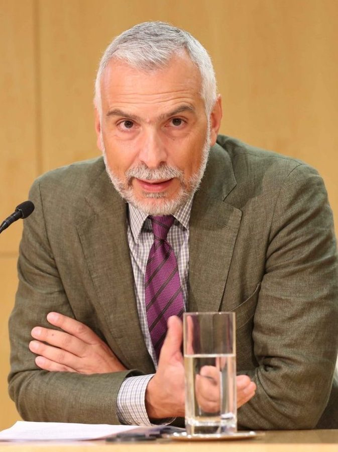 Madrid estrecha sus lazos con Italia. Por primera vez la Fiesta de la República, día nacional en ese país, se abre a todos los madrileños gracias a la colaboración de la Embajada italiana y el Ayuntamiento de Madrid, junto con la Cámara de Comercio Italiana para España (CCIS).